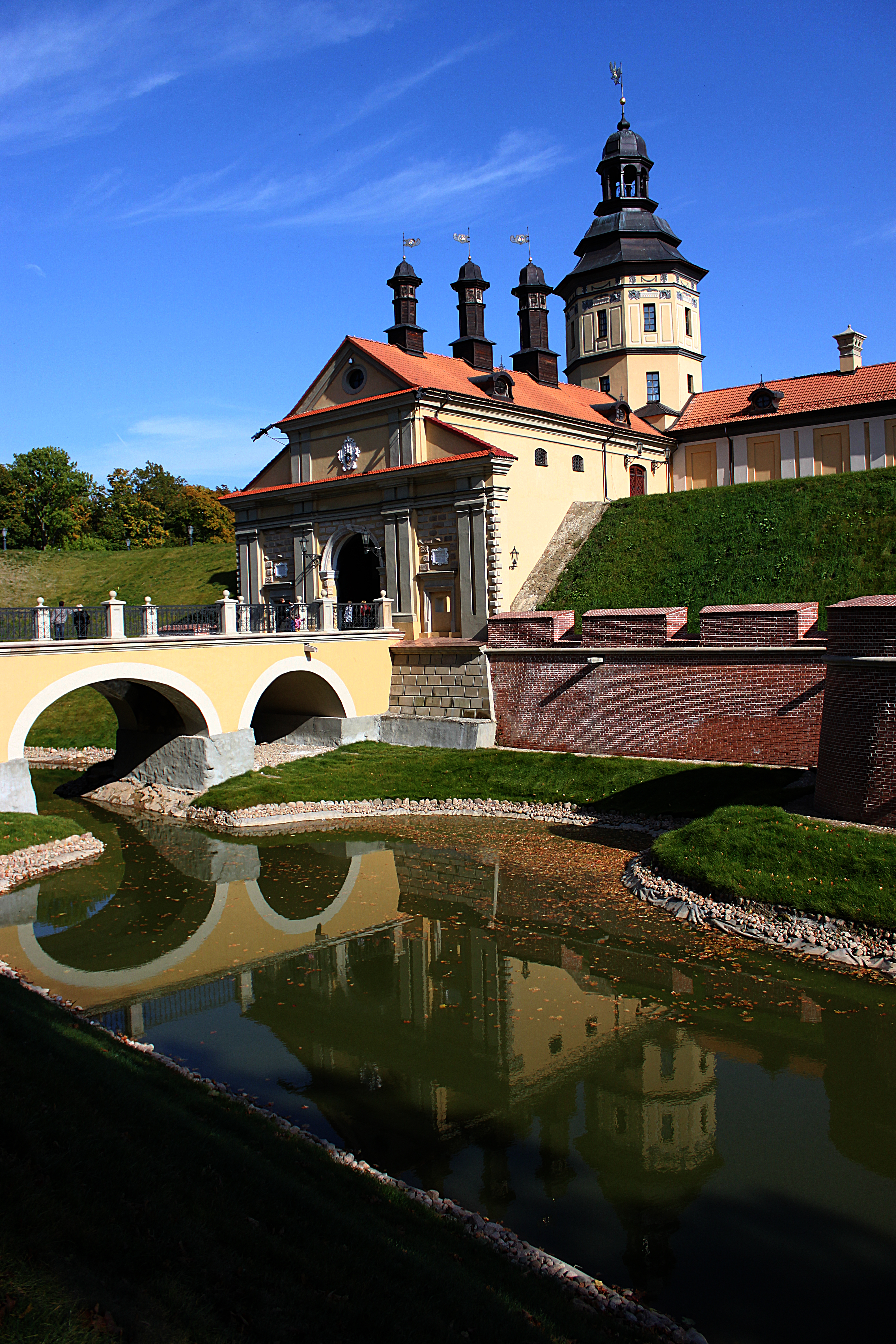 Нясвіжскі замак. 2011. Від на галоўны ўваход